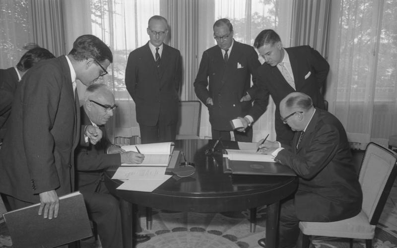 Unterzeichung eines deutsch-pakistanischen Luftverkehrsabkommens im Auswärtigen Amt, Bonn. Deutschland wurde in Vertretung des Bundesministers des Auswärtigen durch den Bundesminister für Angelegenheiten des Bundesrates und der Länder Dr. von Merkatz repräsentiert. Auf pakistanischer Seite durch den Ausserordentlichen und Bevollmächtigten Botschafter M. Ziaud-Din.